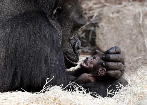 Gorilladame Bagira ist eine erfahrene Mutter